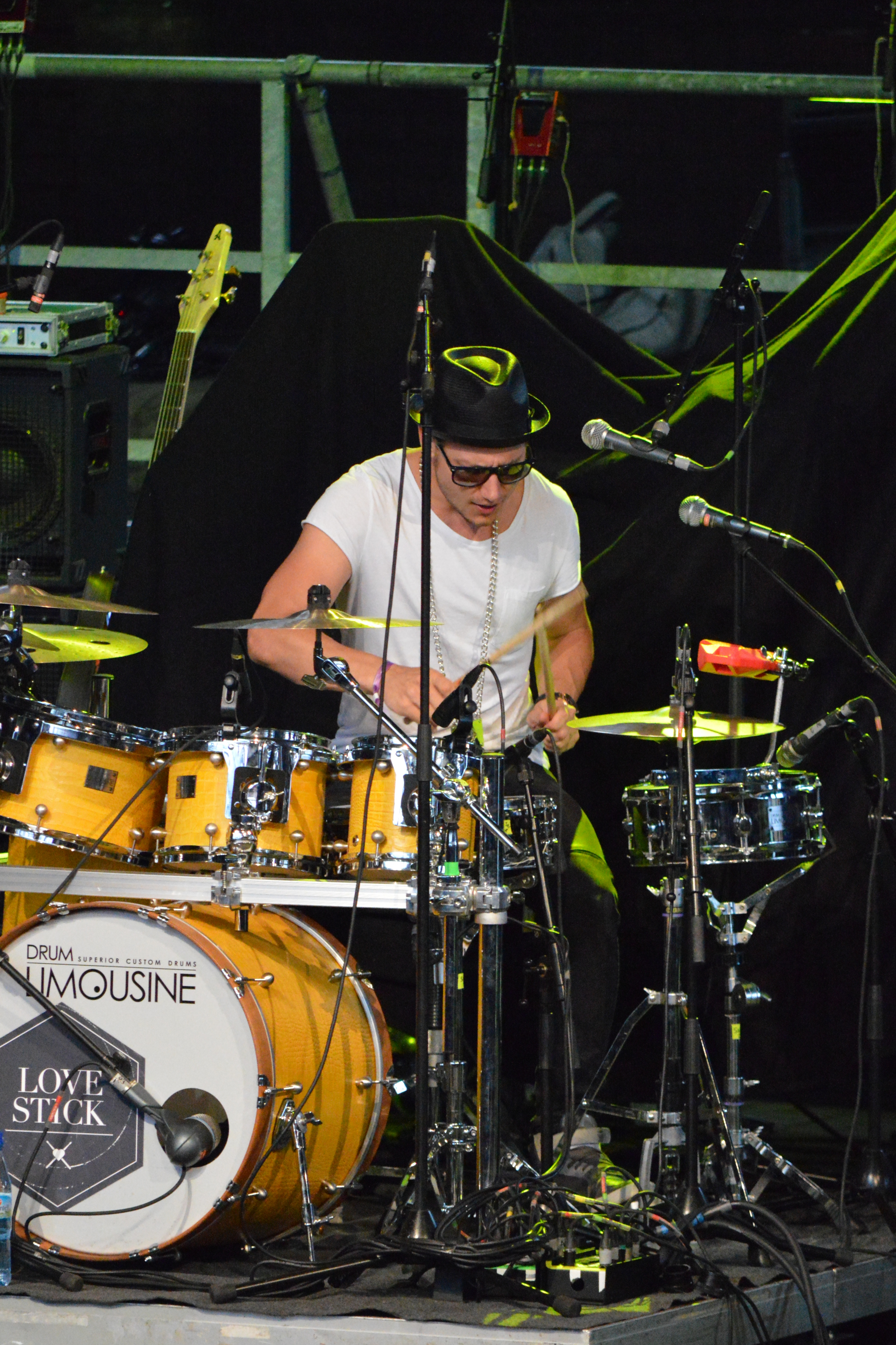 Mark Falgren, Schlagzeuger der Band Lukas Graham, beim Traumzeit-Festival 2013